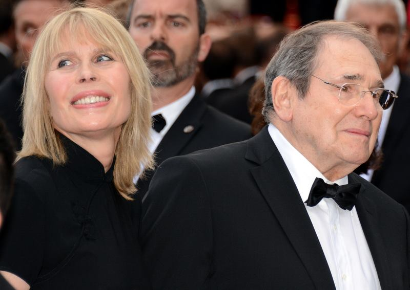 Candice Patou et Robert Hossein au festival de Cannes